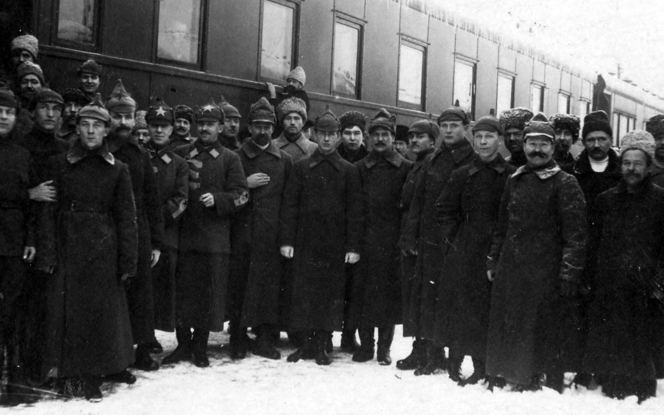 Командный и политический состав поезда Троцкого (1918-1920)